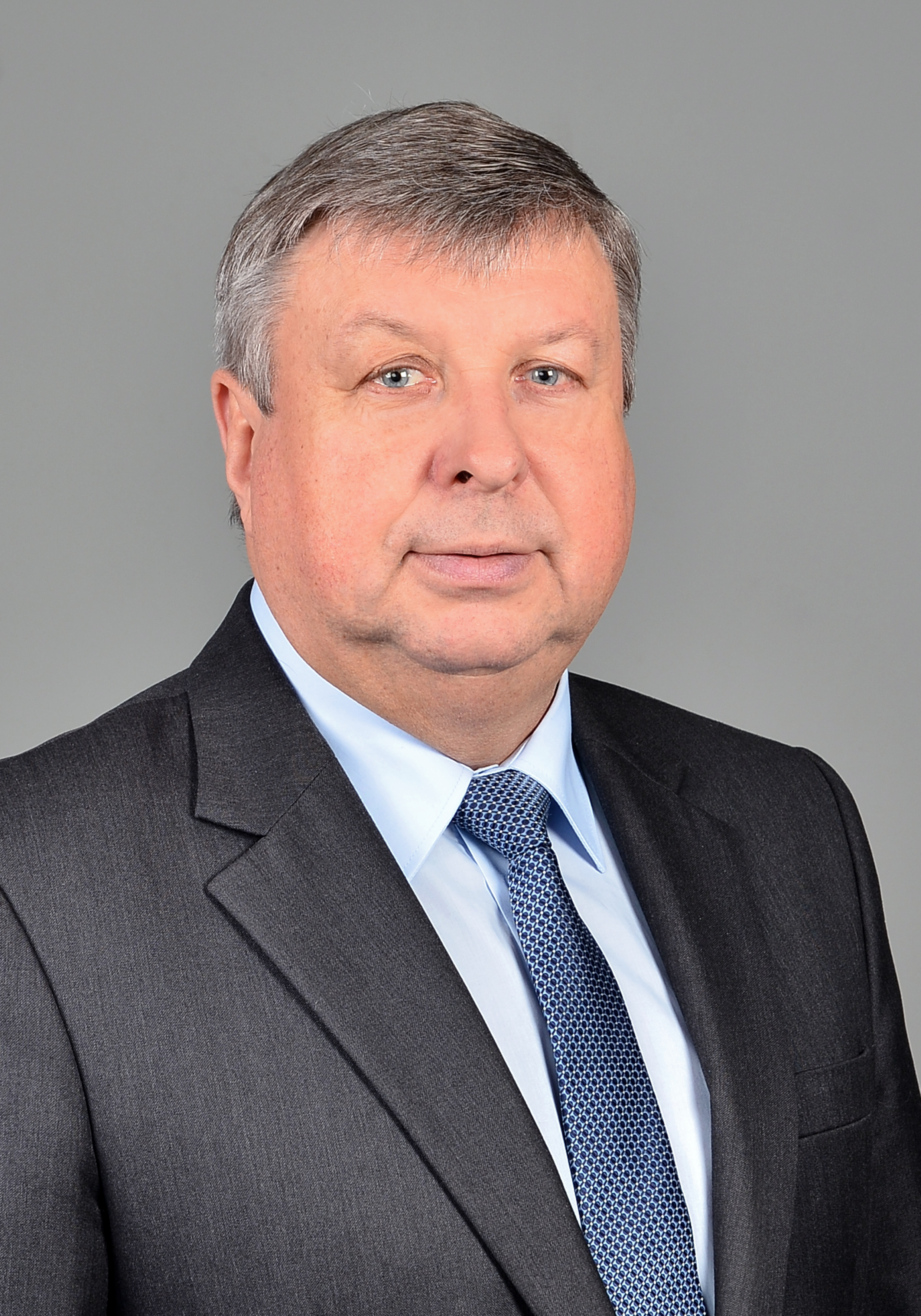 Trakų rajono savivaldybės administracijos direktorius